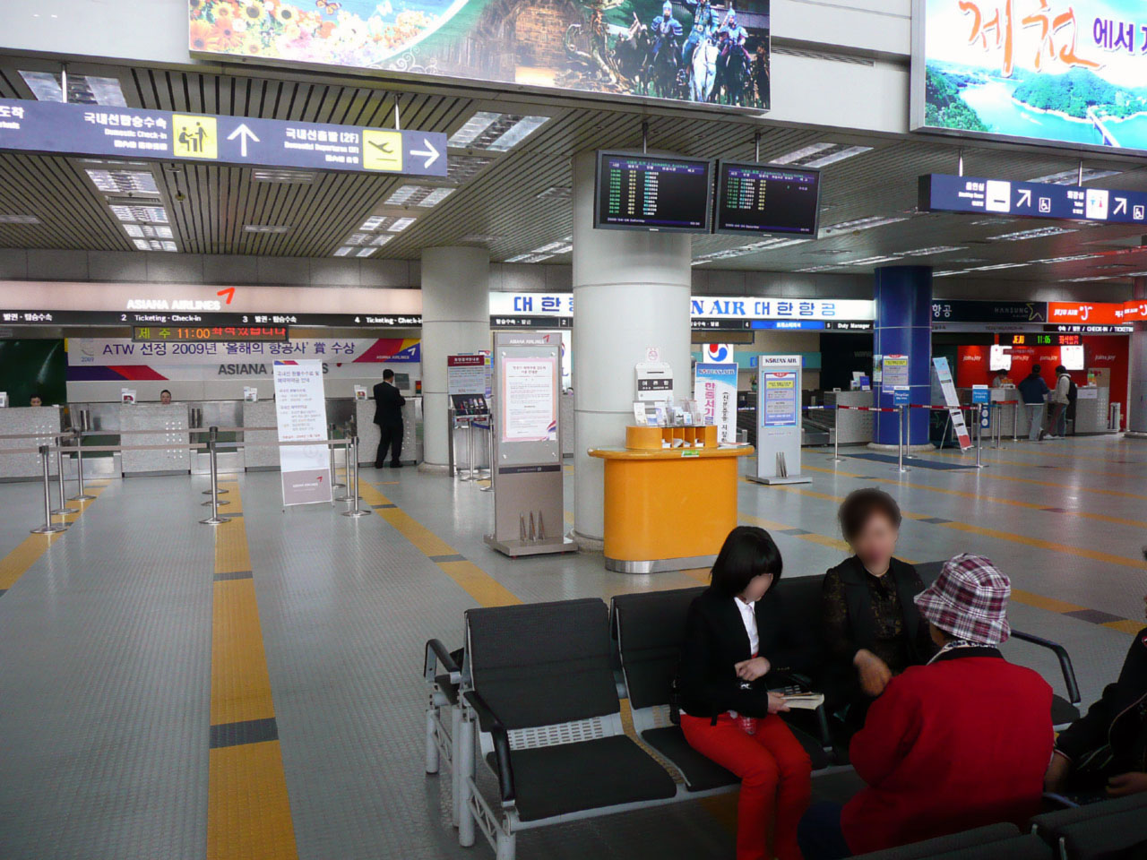 清州国際空港国内線チェックインカウンター